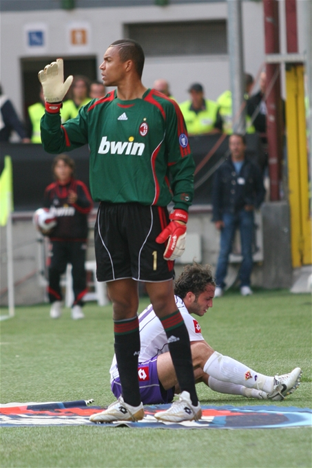 Nelson Dida